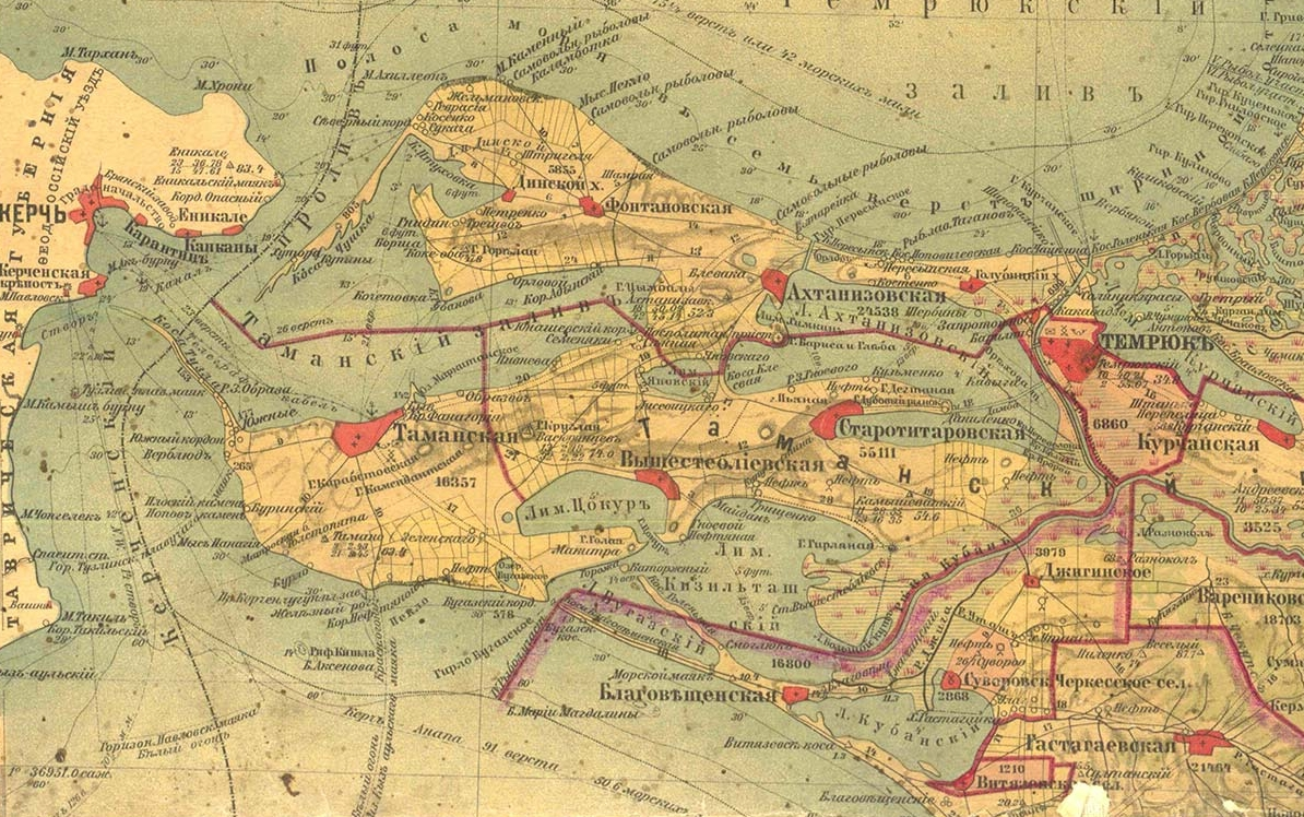 Фрагмент карты Кубанской области, Черноморской губернии и части Сухумского округа